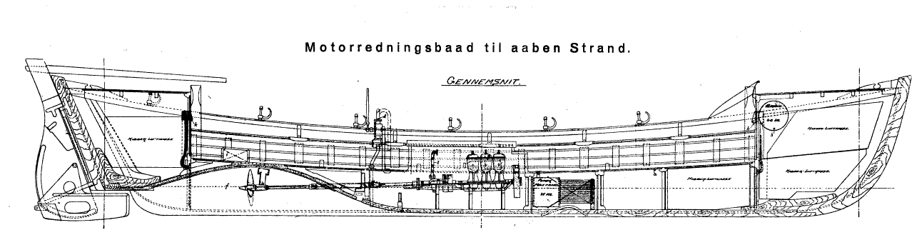 motorredningsbåd tegning fra Salmonsens leksikon